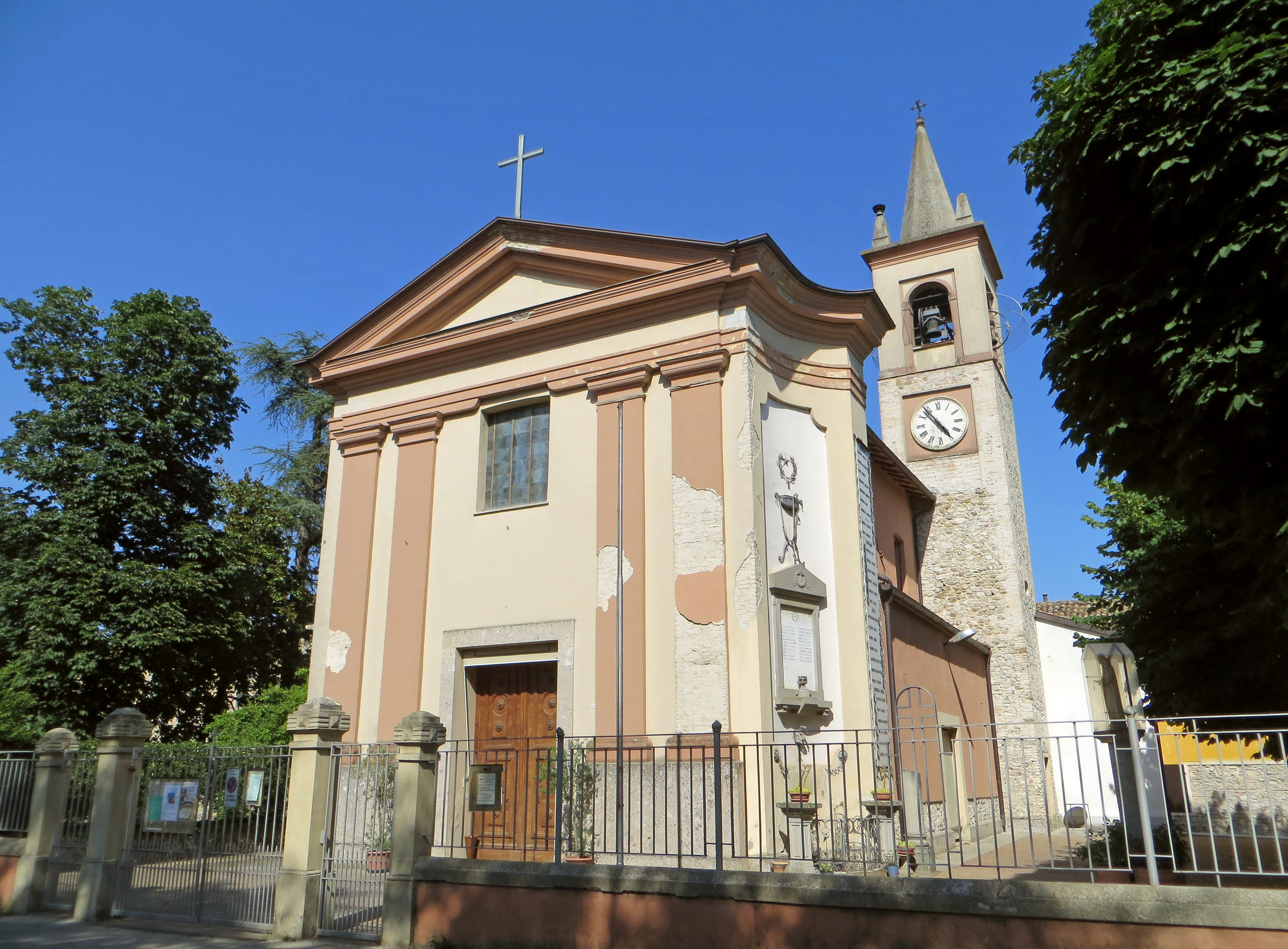 Chiesa di San Donnino (Panocchia, Parma) - facciata e lato sud